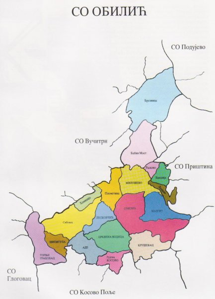 Карта Општине Обилић